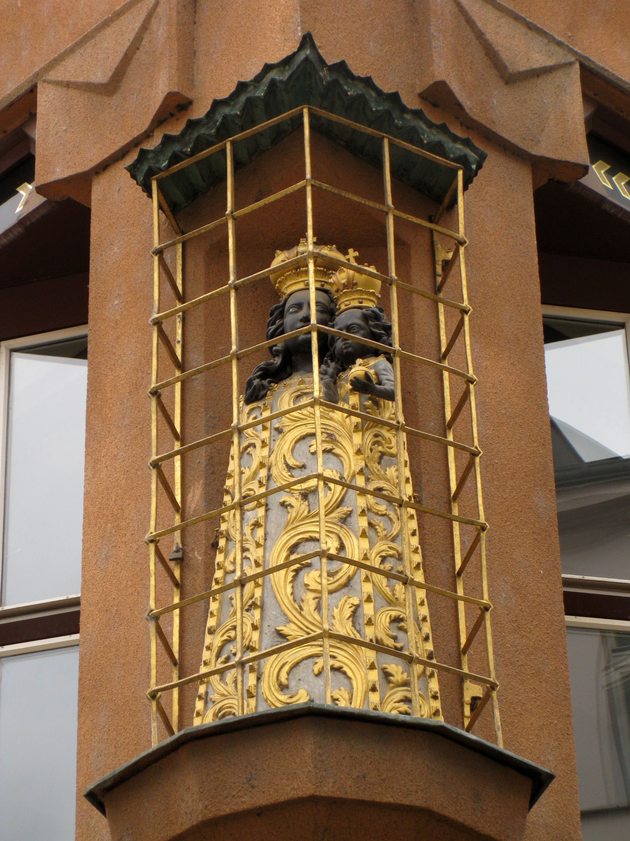 Obchodní dům U Černé Matky Boží, U Zlaté mříže (Staré Město), Praha 1, Celetná, Ovocný trh (19) 569/34, Staré Město